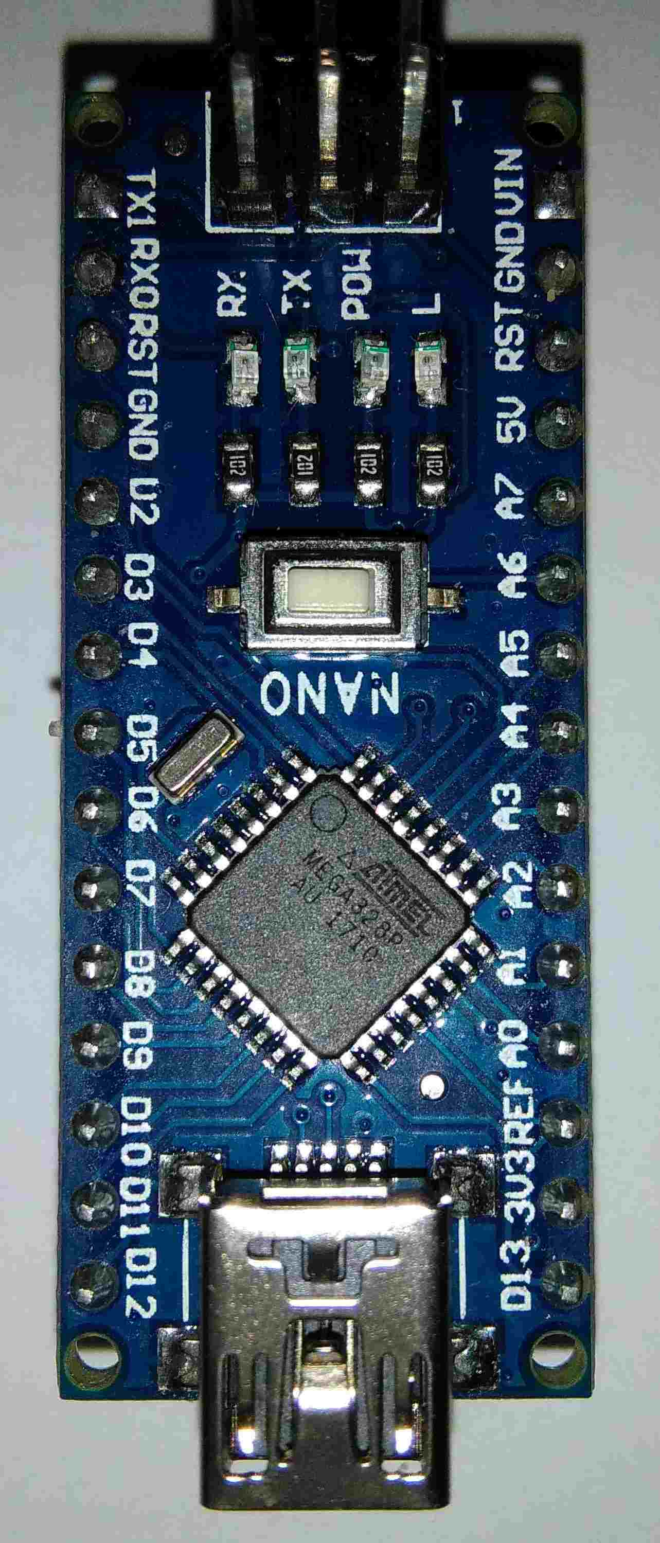 arduino.cc/en/Main/ArduinoBoardNano